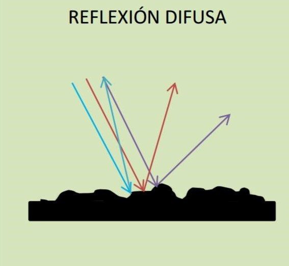 Reflexión difusa